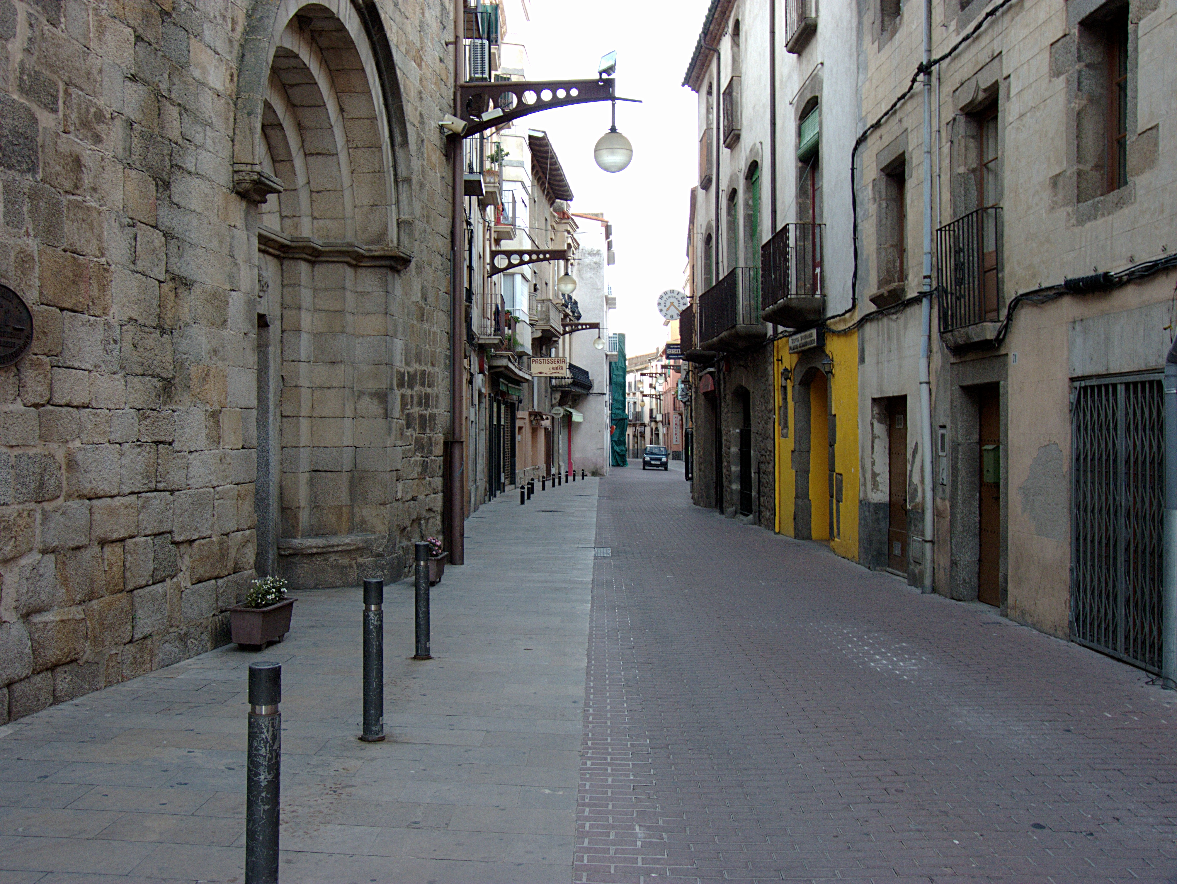 Entrée de l'église paroissiale Sainte-Marie et Grand Rue, La Jonquera (Haut-Ampurdan, Gérone, Catalogne, Espagne)